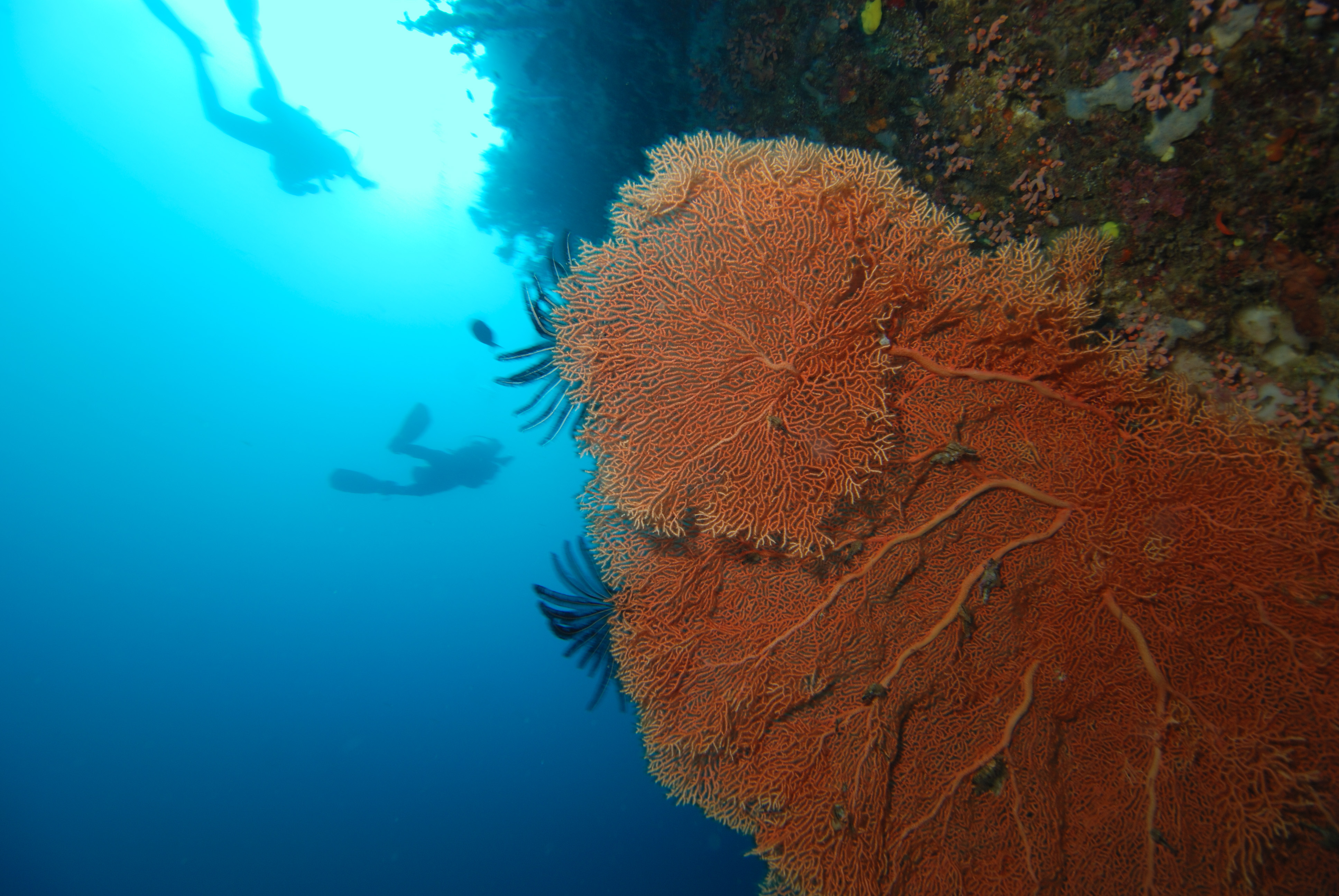 gorgooon